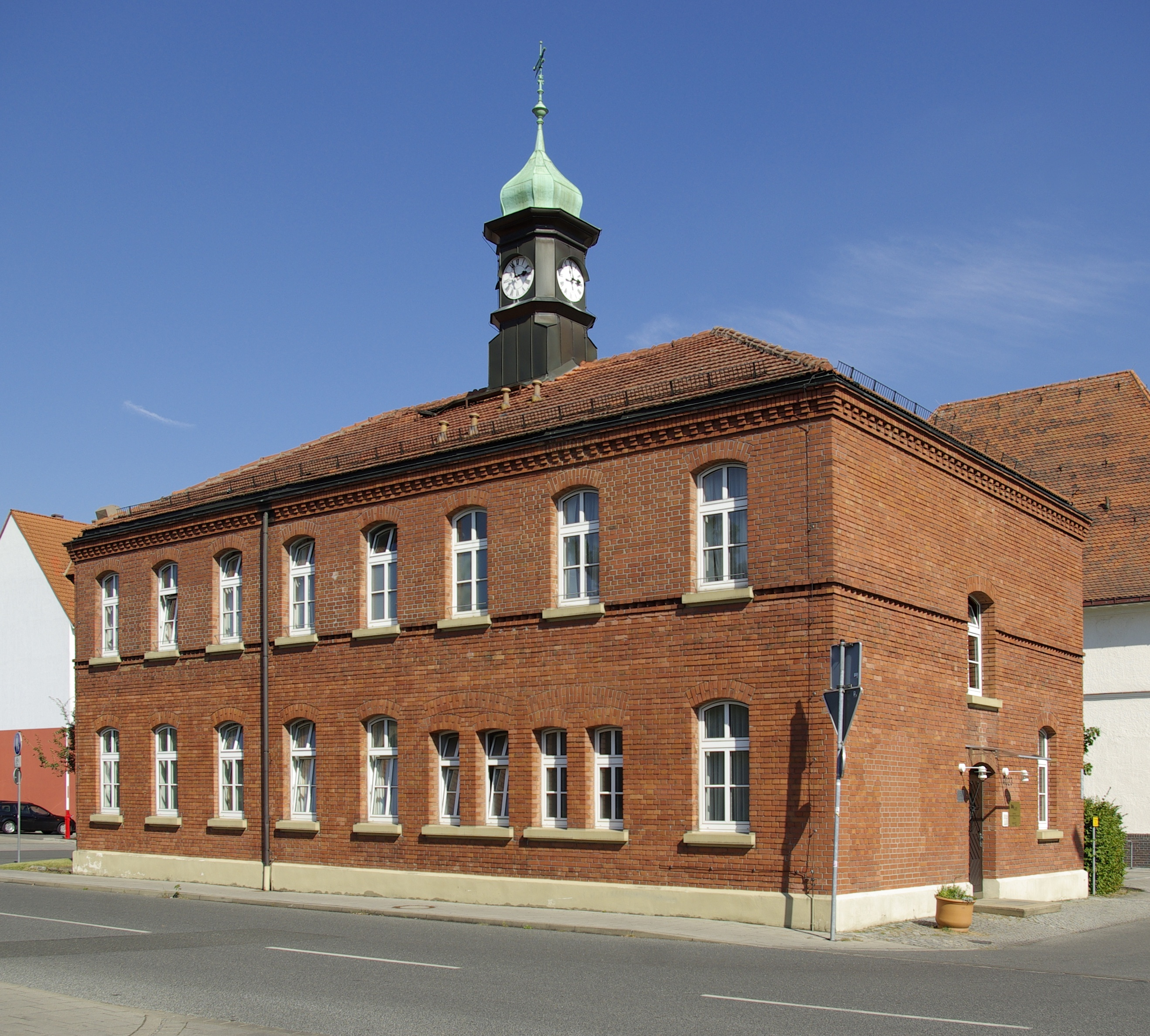 Ehemaliges Wach- und Arrestgebäude (Gebäude-Nr. 4023) der Artilleriekaserne in der Carl-Thiersch-Straße 5 in Erlangen.